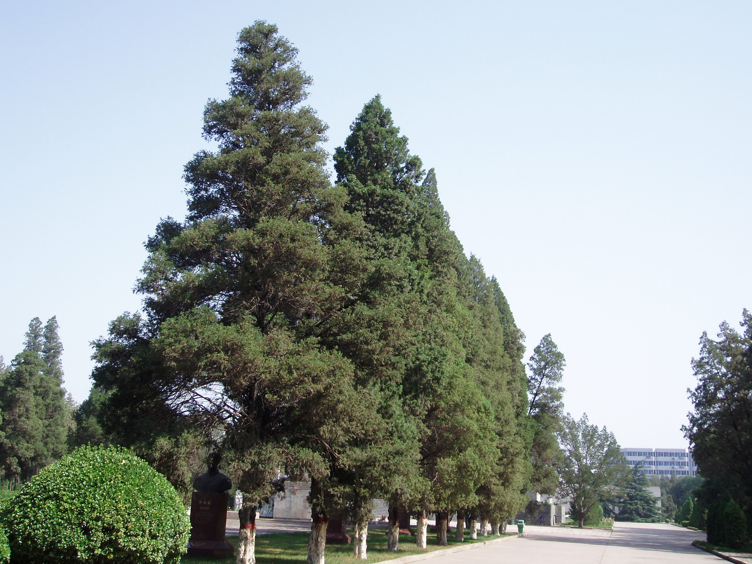 Chinese juniper trees